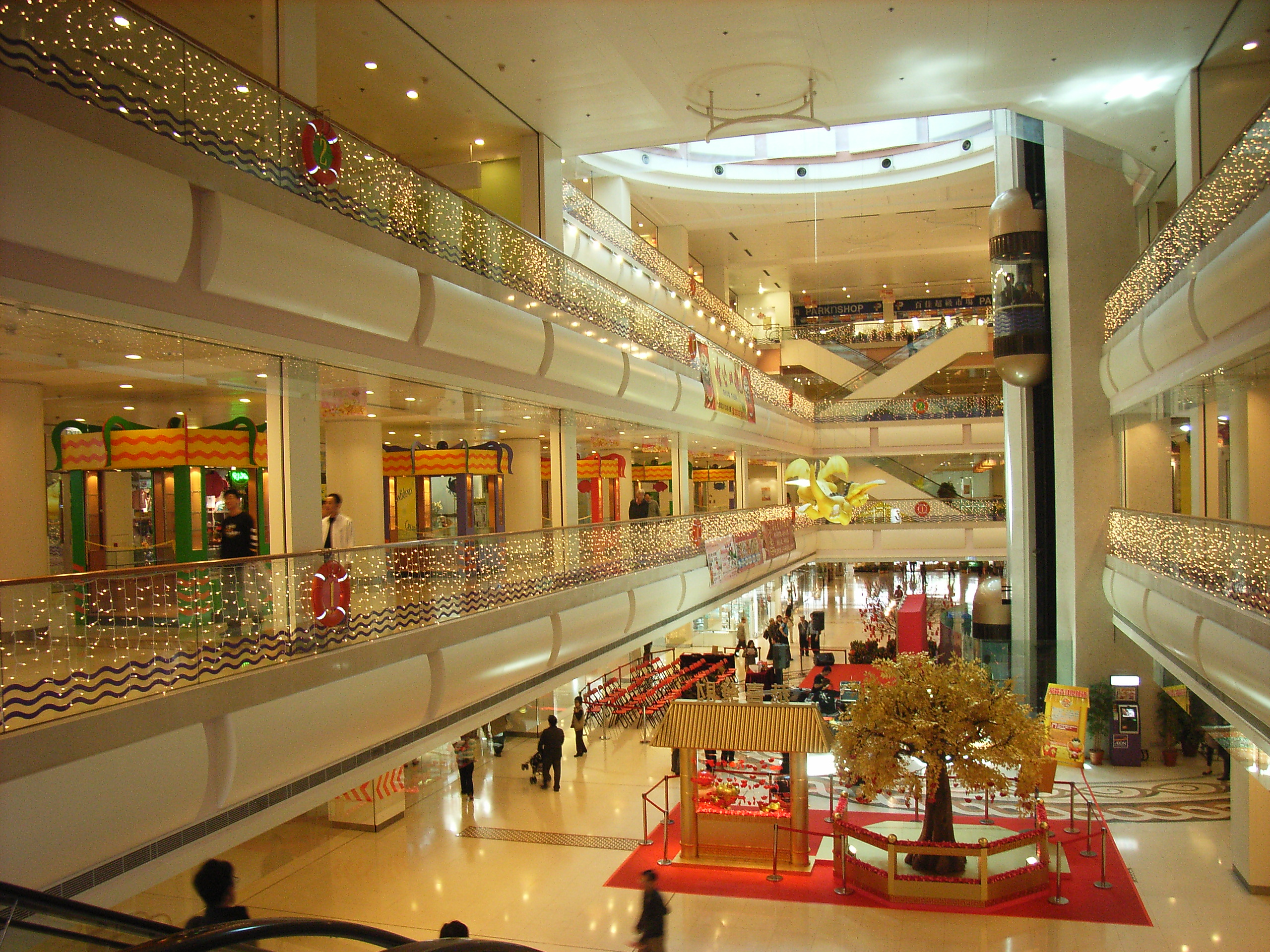 漁人碼頭 (九龍), Fisherman's Wharf, Laguna Verde, 海逸豪園, Tai Wan Road, 大環道, Hung Hom, Hong Kong